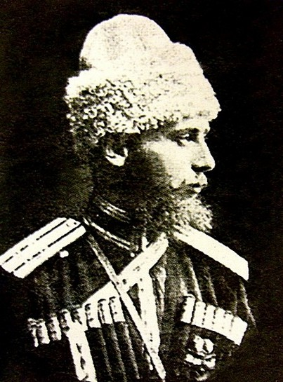 Князь, толстовец Дмитрий Александрович Хилков (1858-1914)